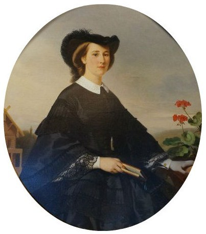 Екатерина Николаевна Орлова, ур Трубецкая (1840—1875)